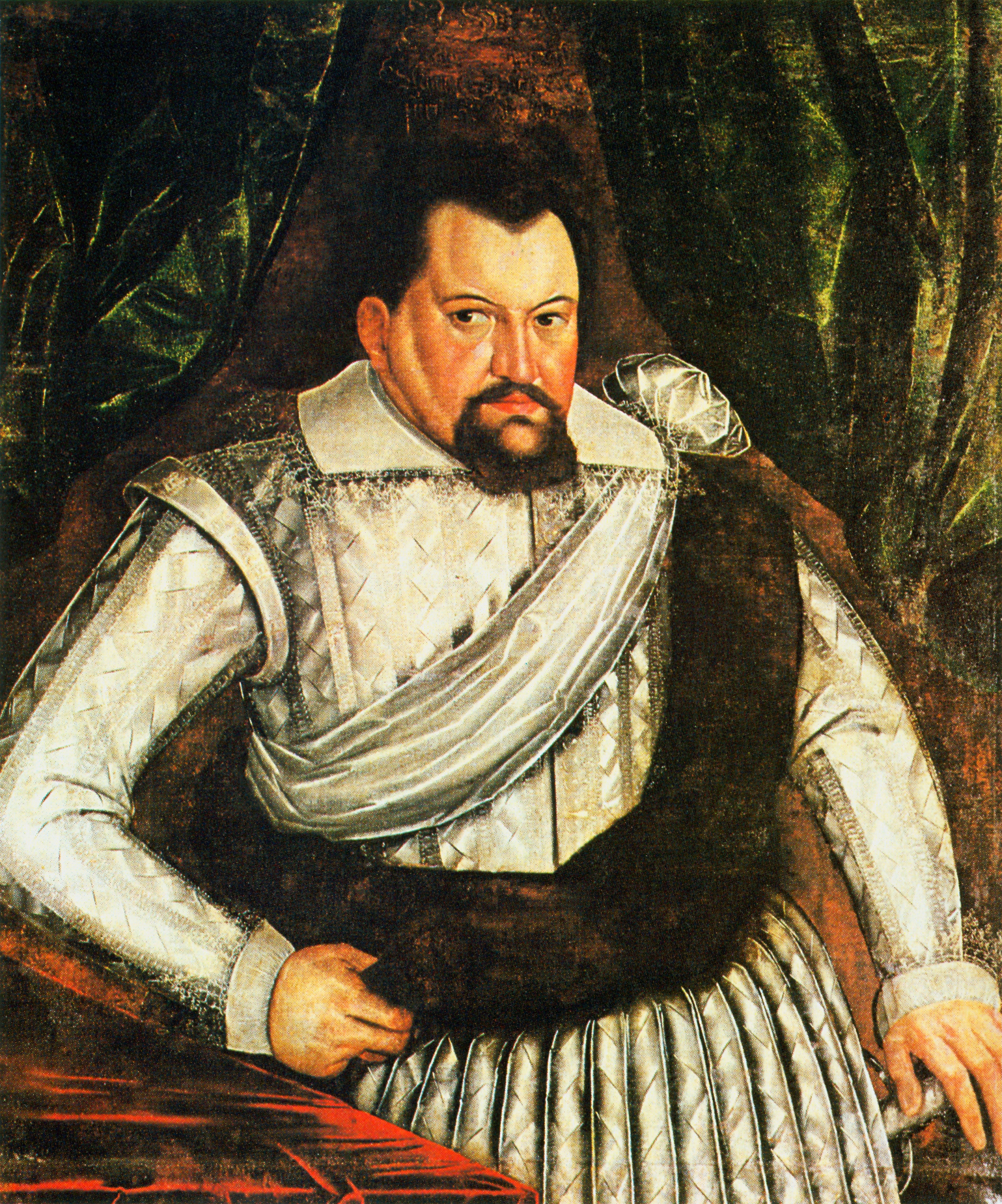 Jagdschloss Grunewald. Verwaltung der Staatlichen Schlösser und Gärten.